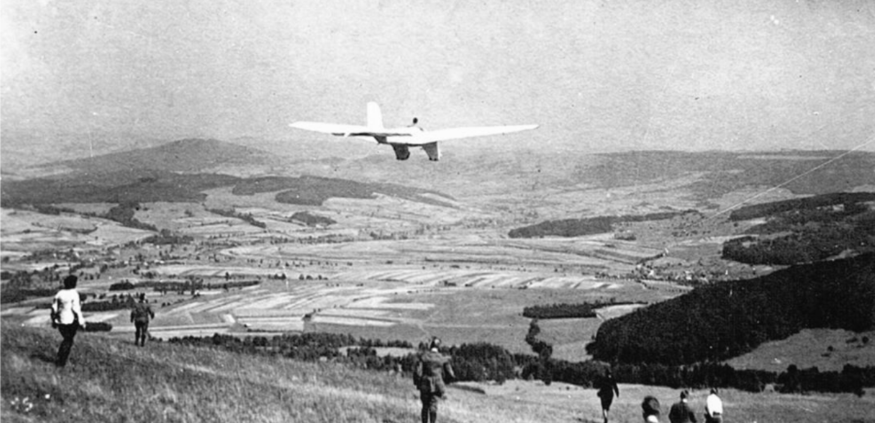 Das Segelflugzeug FVA-2 Blaue Maus 1921 in der Rhön